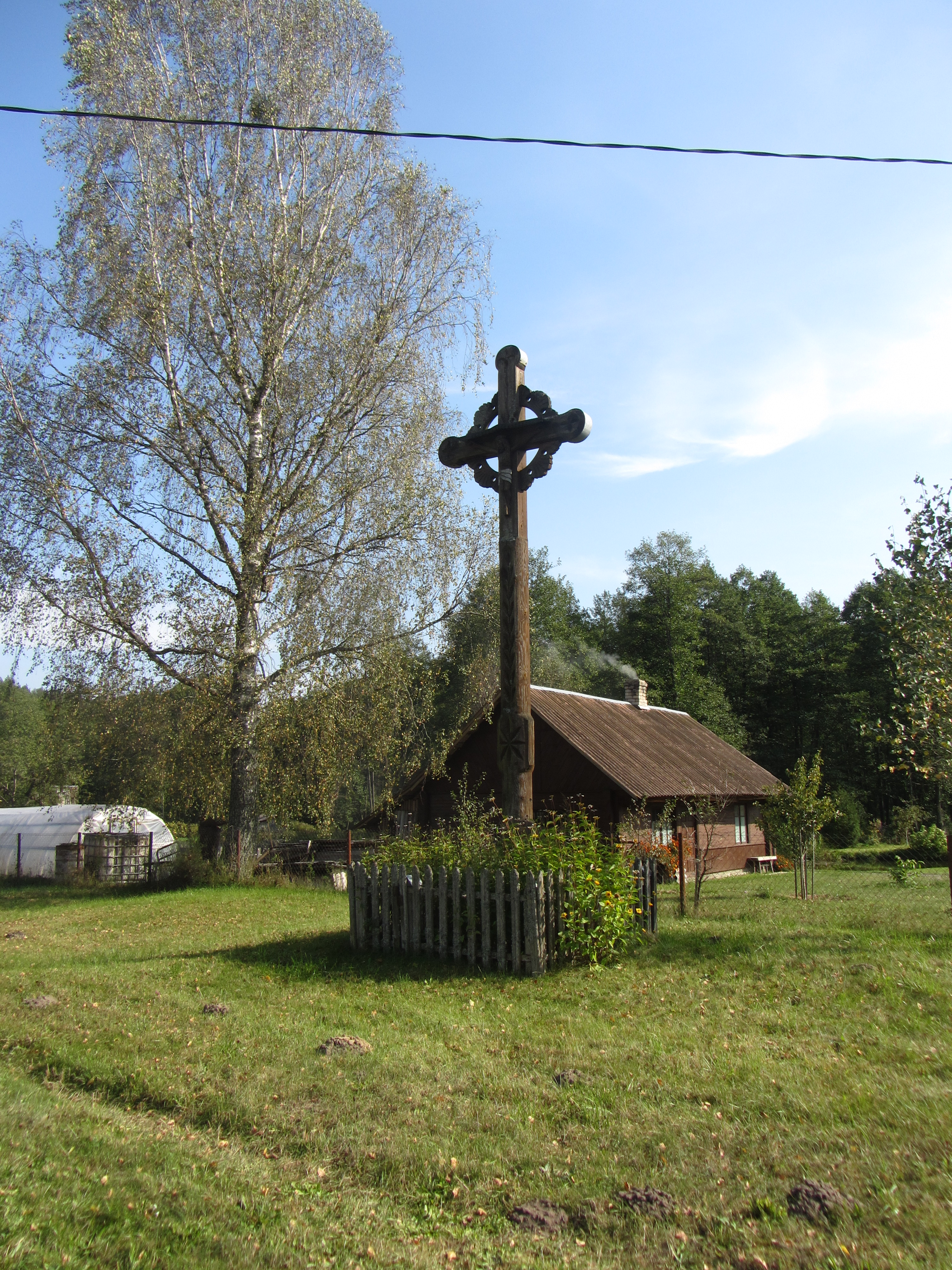 Dubininkas 65344, Lithuania